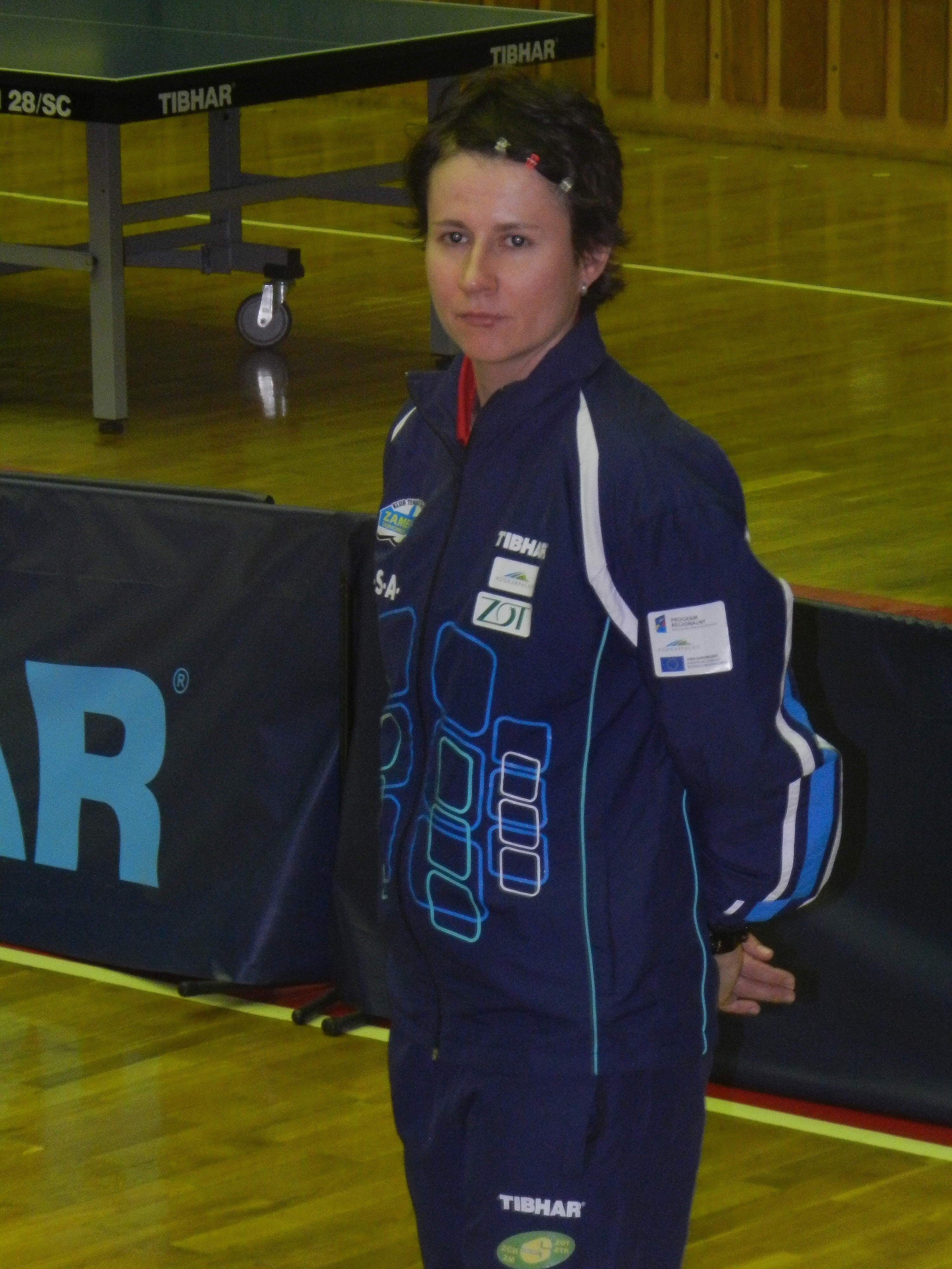 Renata Štrbíková. Zdjęcie wykonano podczas meczu o awans do ćwierćfinału rozgrywek Pucharu ETTU pomiędzy: KTS Zamek Tarnobrzeg, a Club Pongiste Lyssois Lille Metropole.